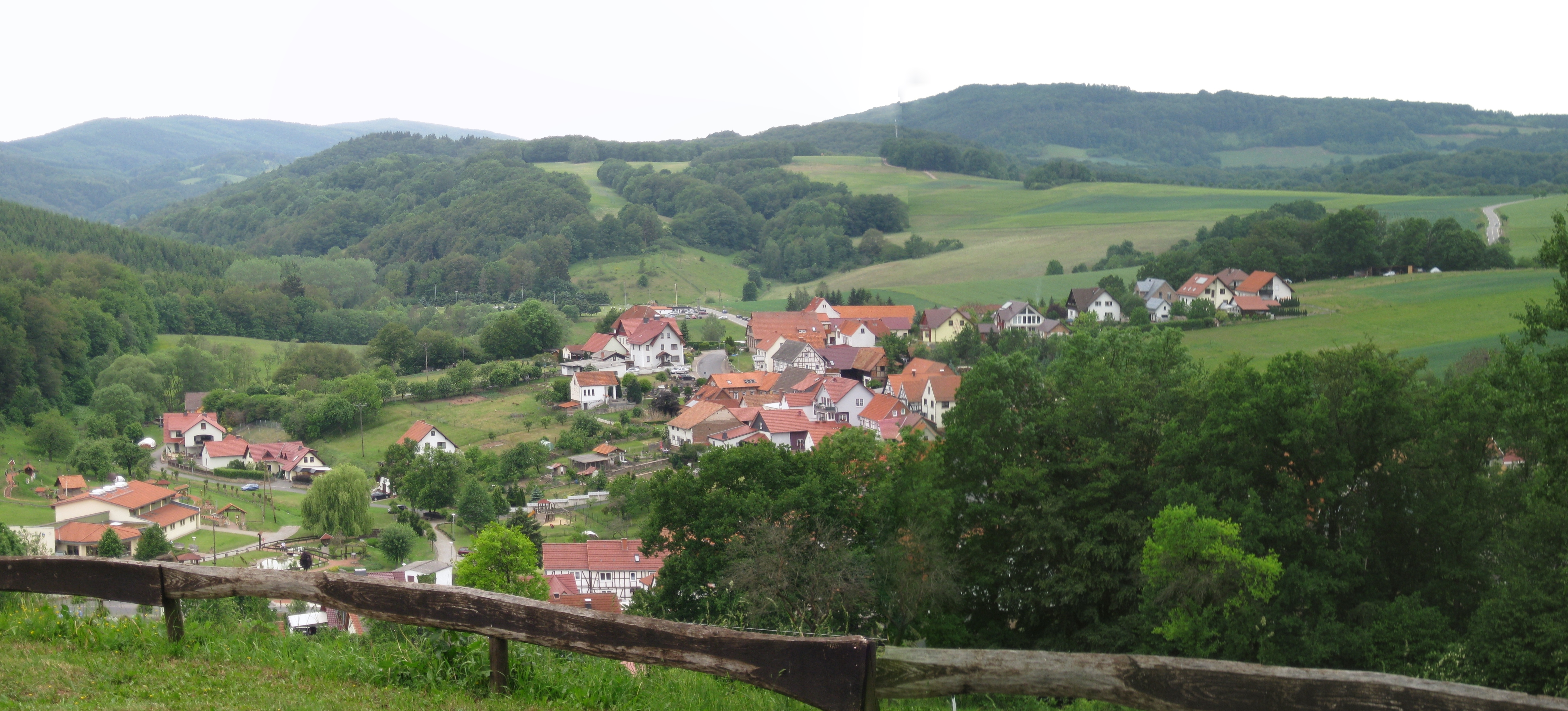 Blick über Mackenrode (im Hintergrund links der Höheberg und rechts der Röhrsberg)